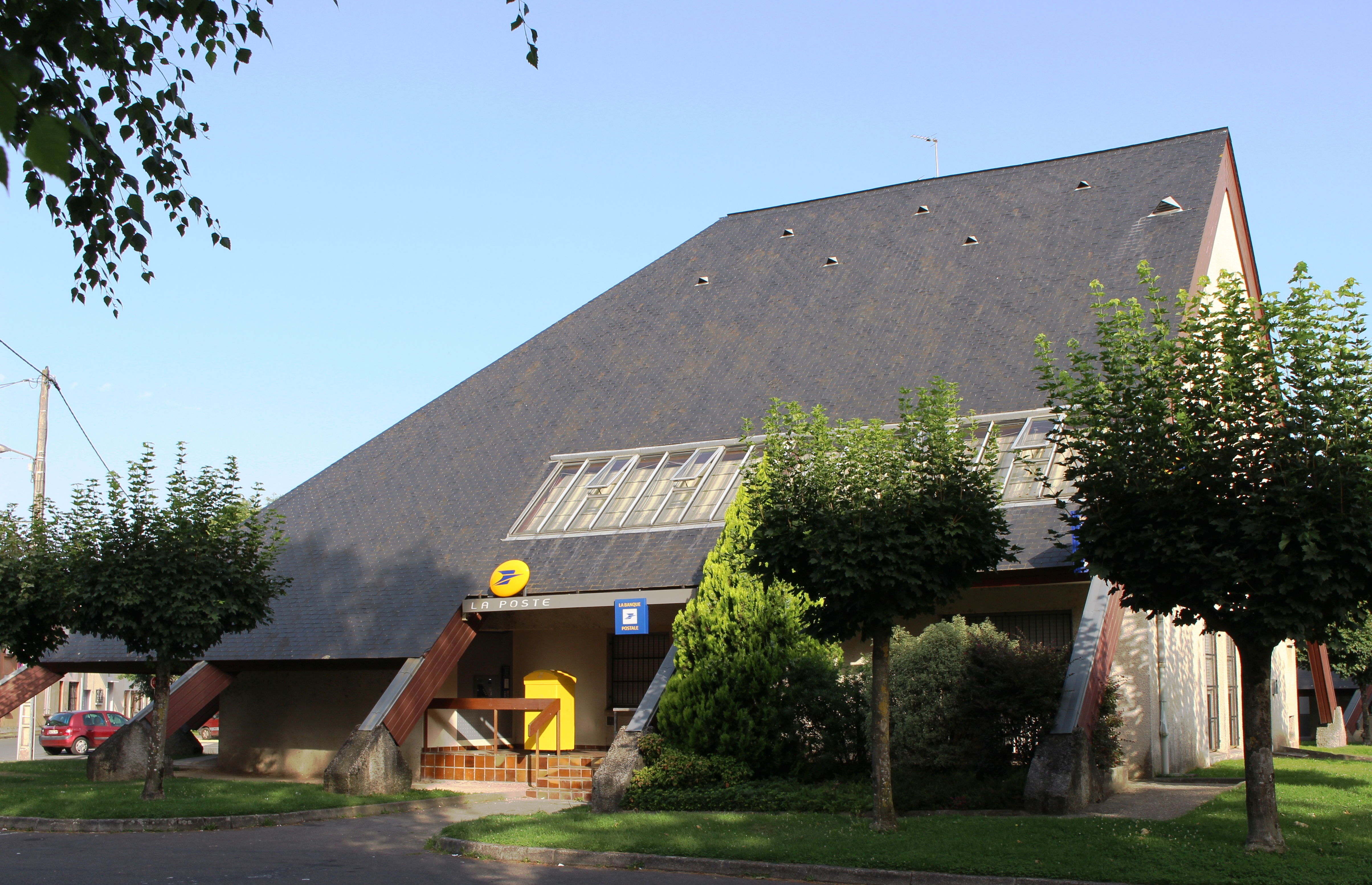 Poste de Bordères-sur-l'Échez (Hautes-Pyrénées)